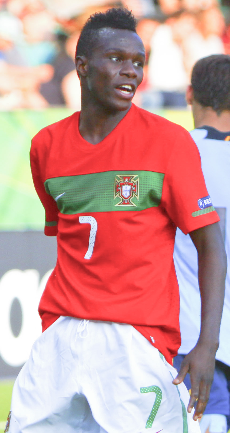 U-19 Portugal vs Spain.